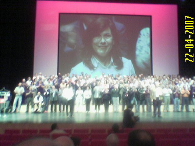 Presentación de los candidatos de la coalición Nafarroa Bai para las elecciones forales y municipales de 27 de mayo de 2007 en el acto celebrado en "Baluarte" (Pamplona) el 22 de abril de 2007. En la foto: En la pantalla gigante, la actual diputada en el Congreso por la coalición y candidata a la alcaldía de Pamplona, Uxue Barkos, recibe los aplausos de los asistentes. Los candidatos de la coalición están en el escenario del acto.